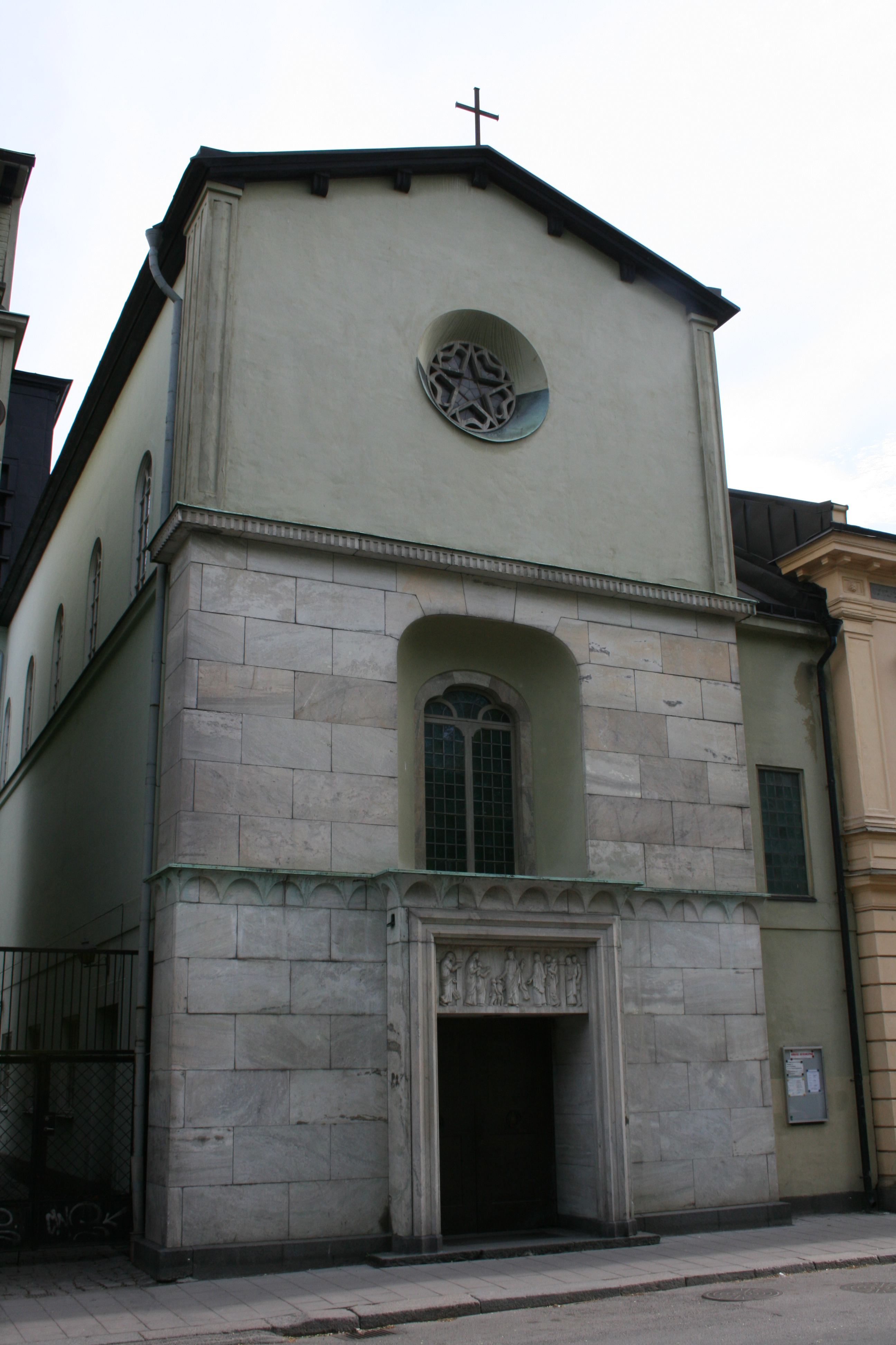 Sankta Birgitta, katolsk kyrka i Norrköping